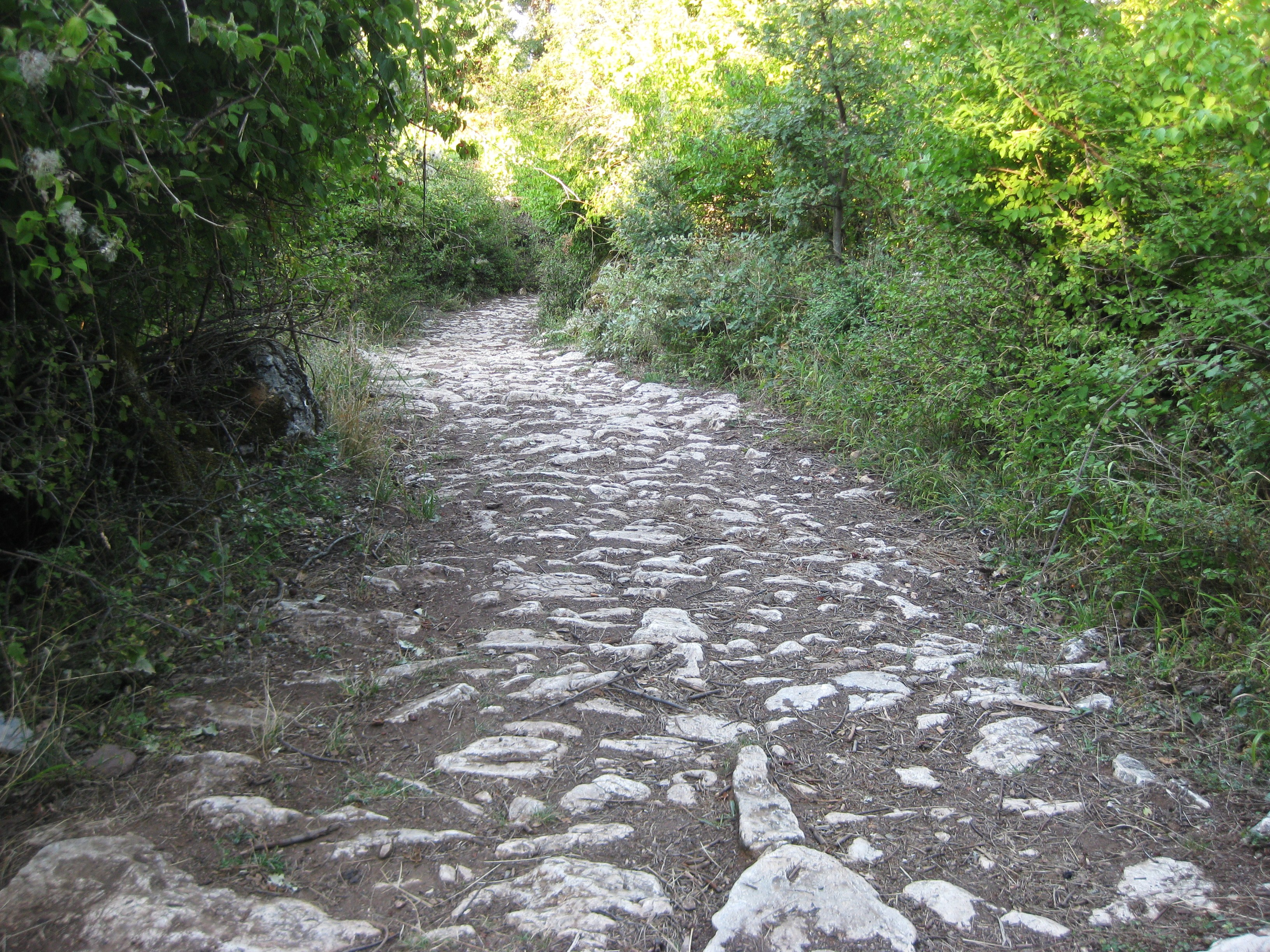 Overblijfselen van de Via Egnatia in Radozda, Macedonië